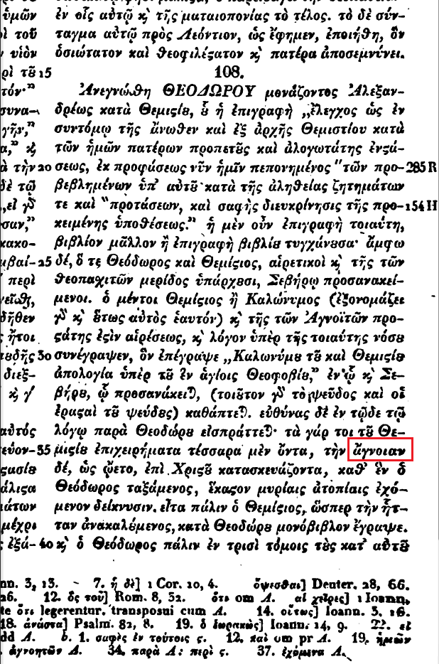 Фотий. Библиотека. Издание 1824 года. Кодекс 108, в котором рассказывается о Фемистии, возглавлявшем ересь агноитов.